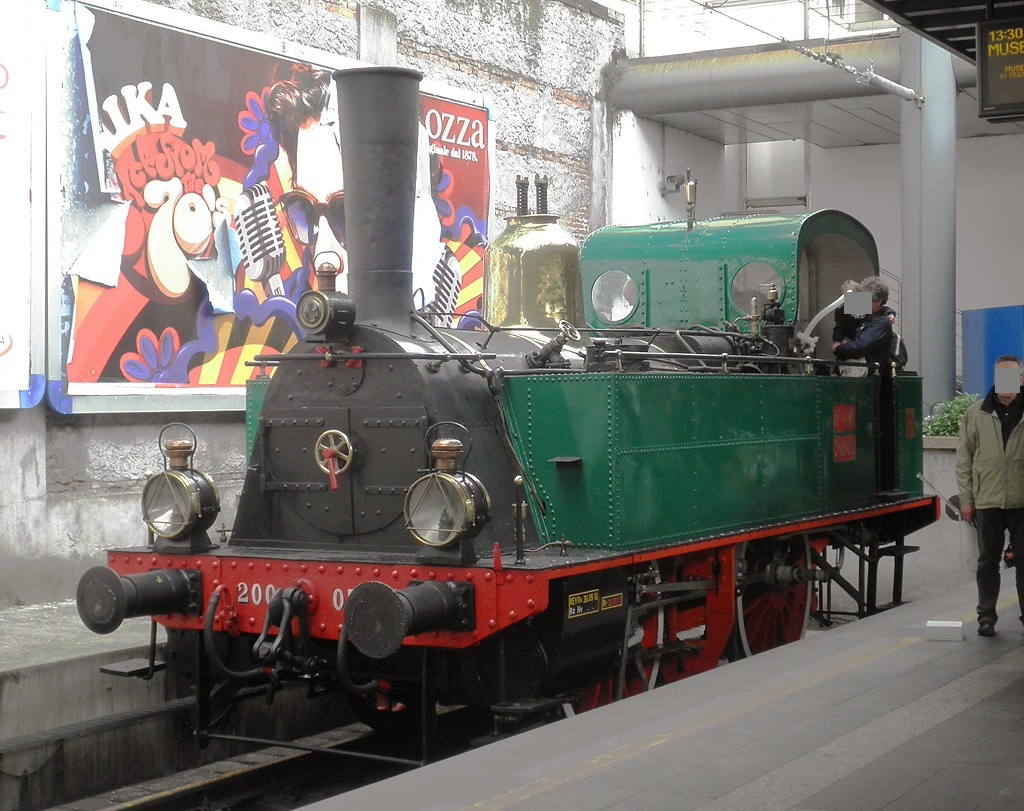 Locomotiva a vapore 200-05 delle Ferrovie Nord Milano, restaurata per treni speciali, esposta alla stazione di Milano Cadorna in occasione del Trenord Open Day 2012